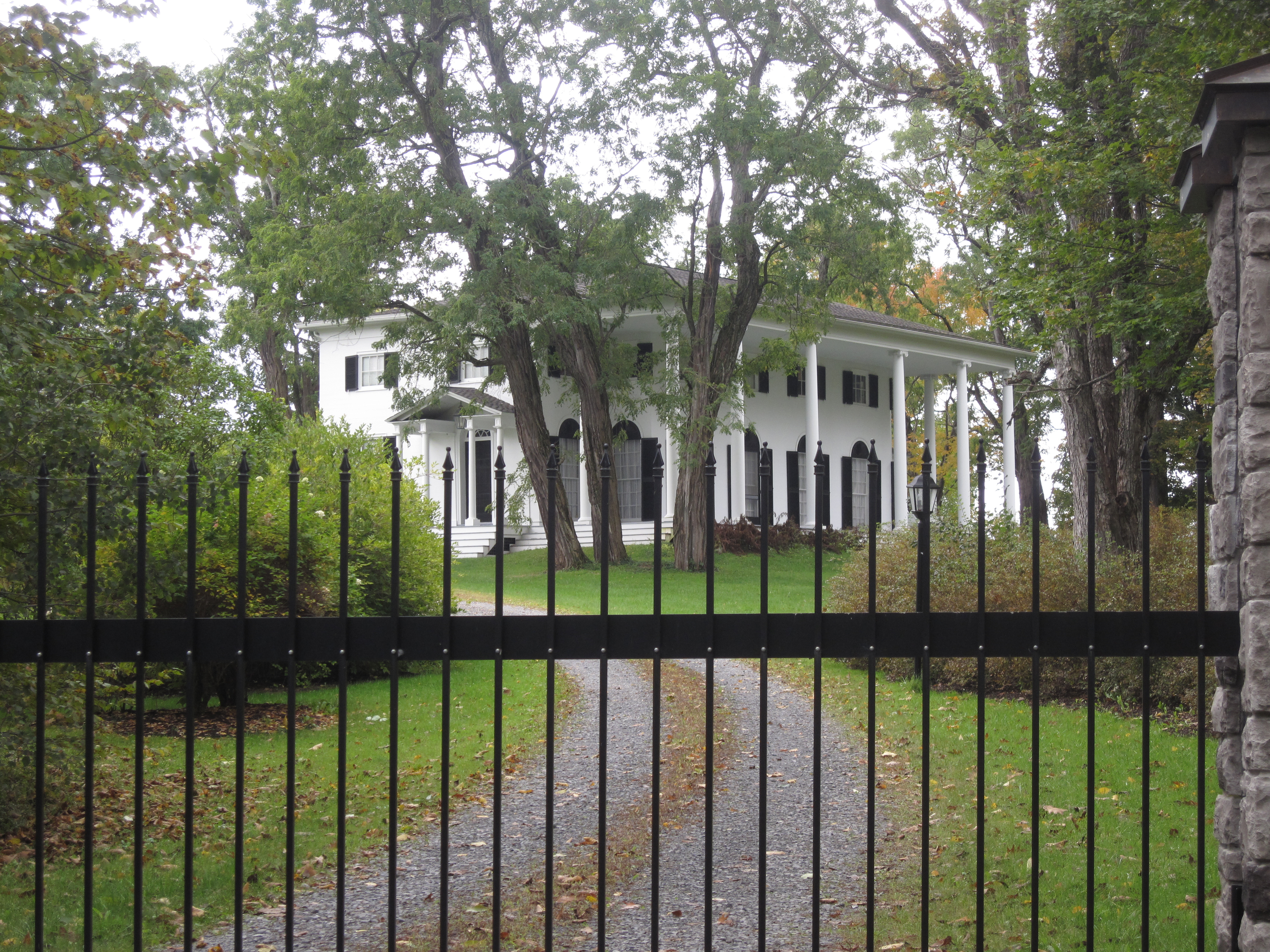 Photo by Wendy Voelker